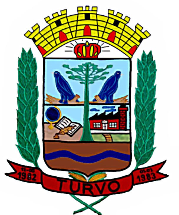 Brasão de Armas do município de Turvo, Paraná, Brasil.